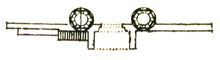 İrəvan qapısının planı